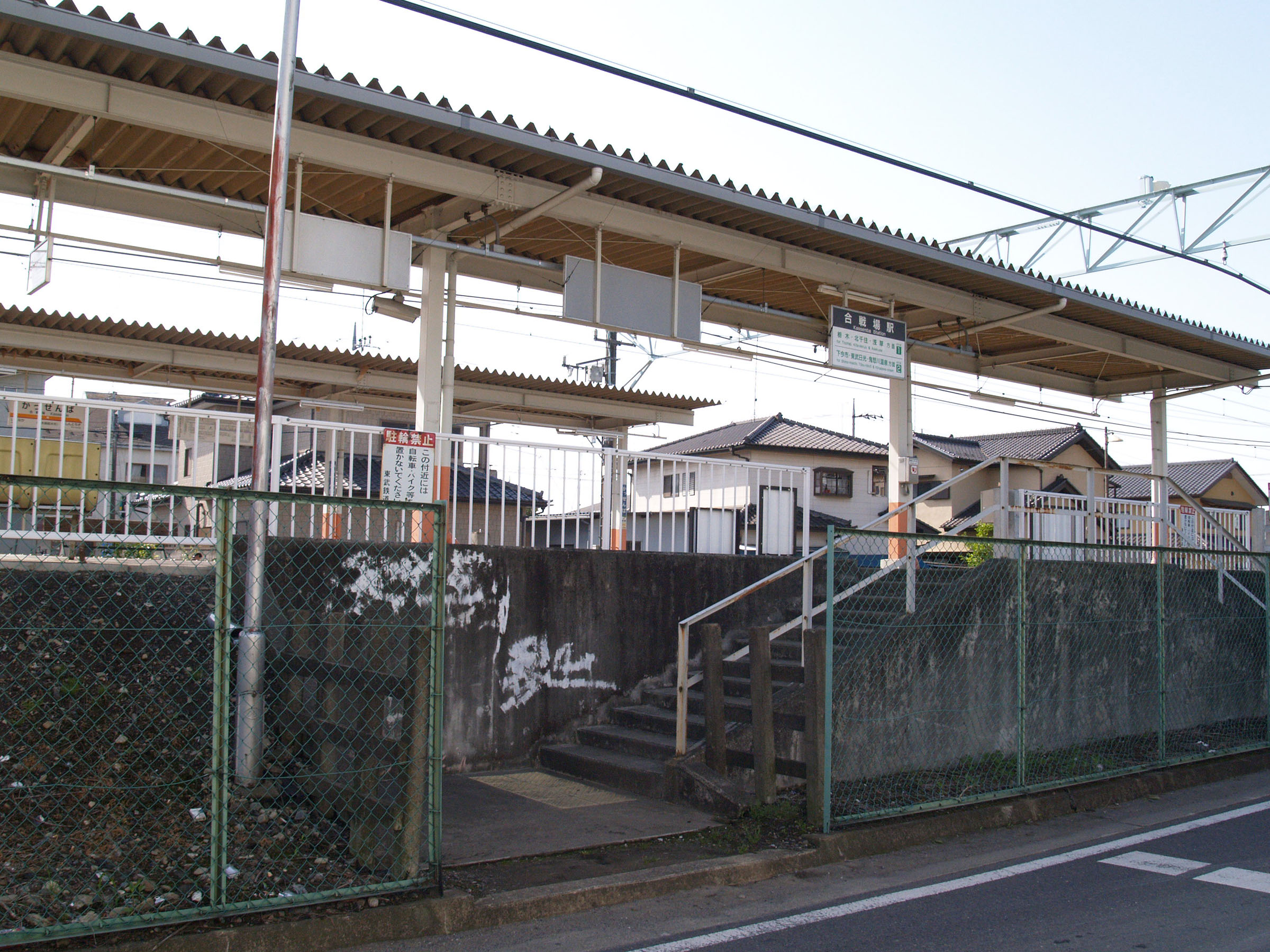 合戦場駅西口